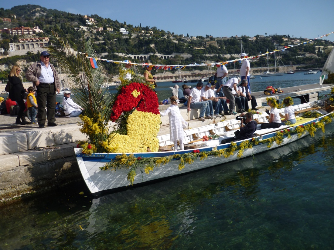 Laïssa Ana, la yole de Villefranche, se préparant au Combat Naval Fleuri